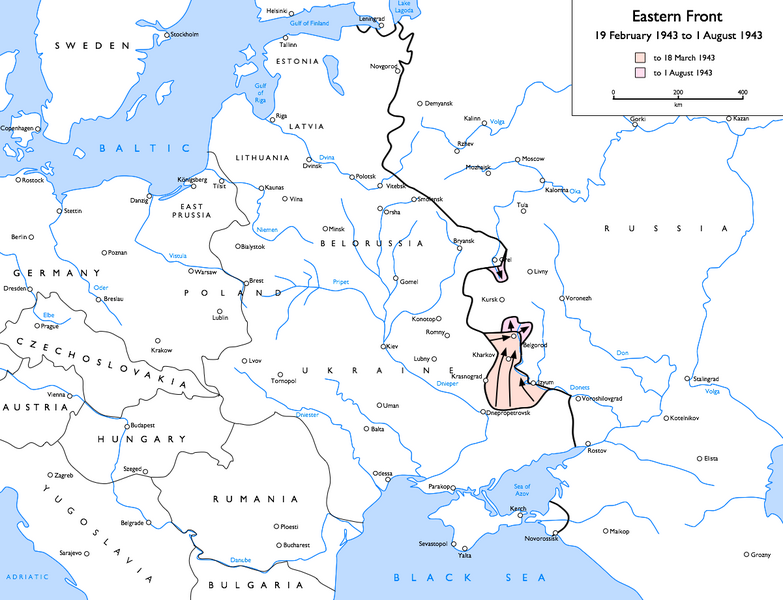 Immagine presa da Image:Eastern_Front_1943-02_to_1943-08.png, disegnata da Gdr